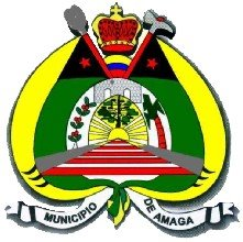 Escudo Oficial del Municipio de Amagá